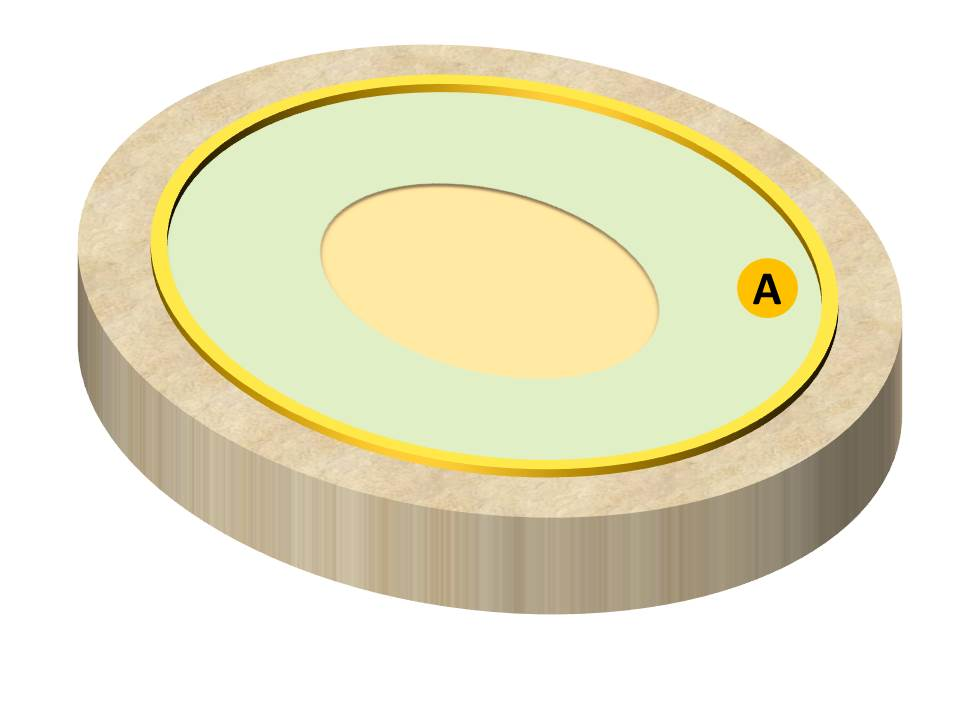 Amphithéâtre antique de Tours phase 3